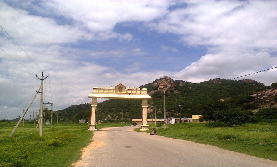 కురుమూర్తి స్వామి దేవాలయ ప్రవేశద్వారం